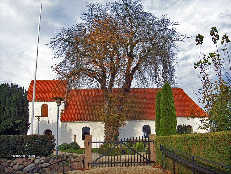 fra syd